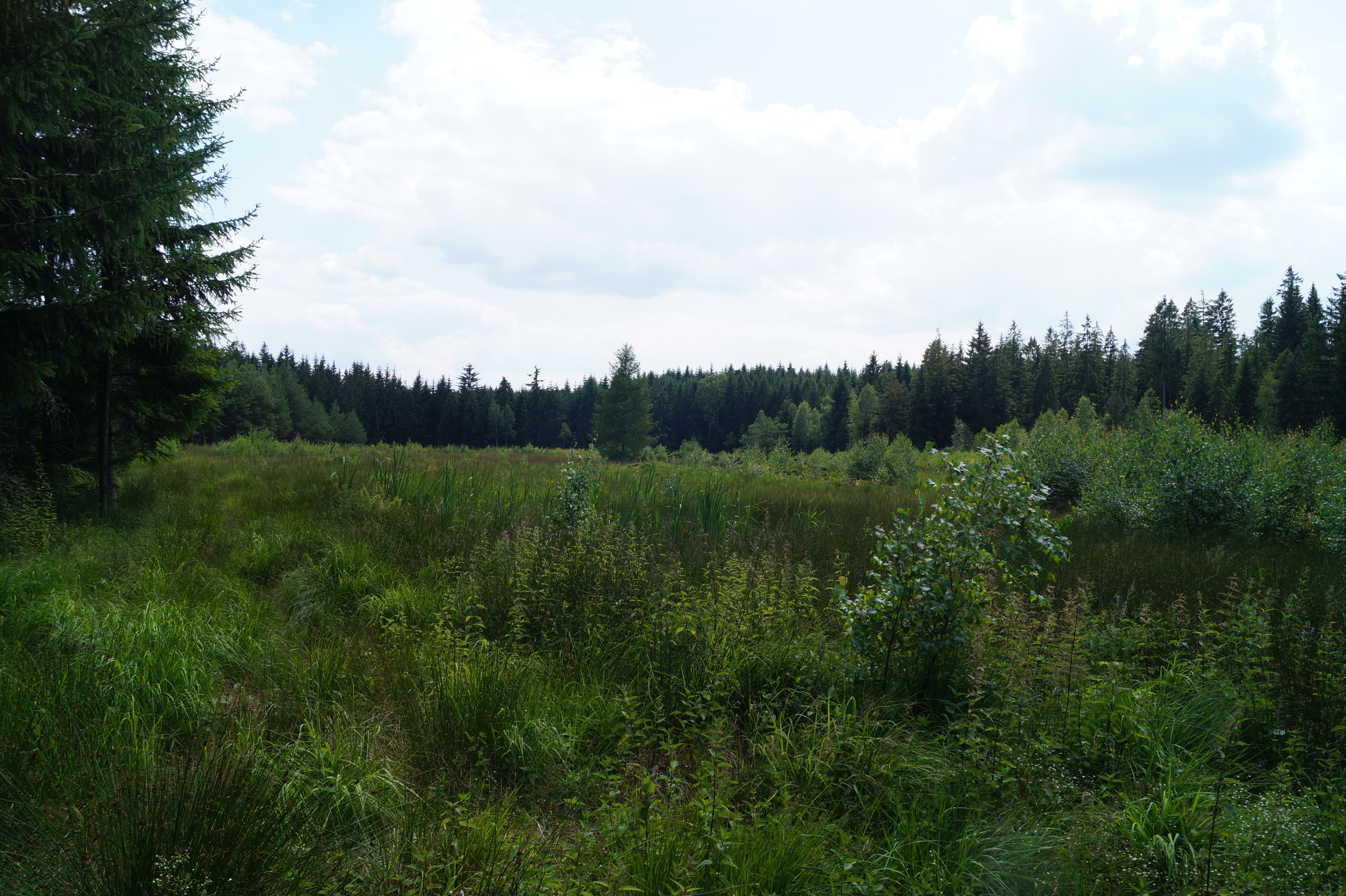 Naturschutzgebiet Heide und Moorwald am Filzteich